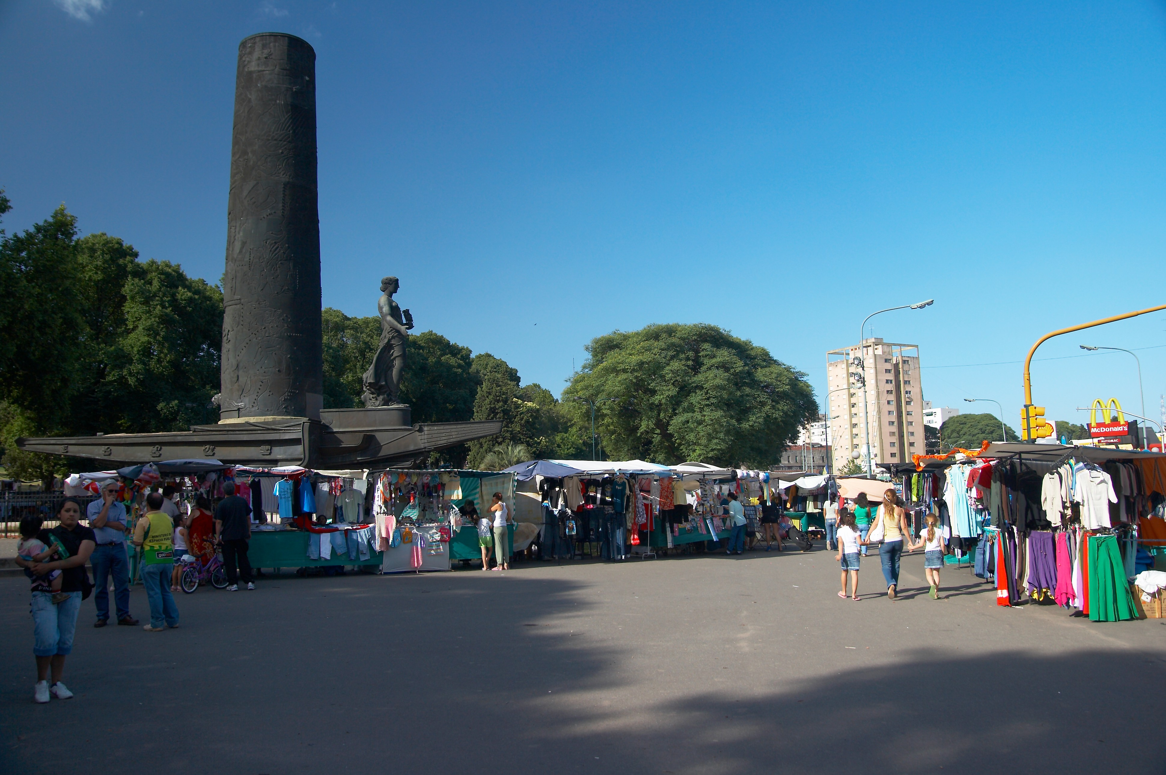 Parque Lezama, barrio de San Telmo, Buenos Aires, Argentina.